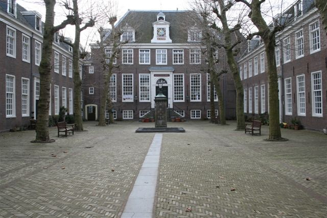 Platanenhof in oude glorie hersteld, tussen Elandstraat en Lauriergracht 99-103, Jordaan, Amsterdam